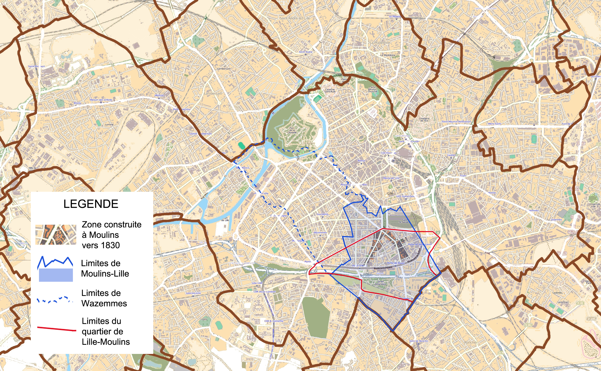 Localisation de Moulins-Lille et de Wazemmes par rapport au territoire actuel de Lille. Les limites du quartier de Lille-Moulins sont indiquées.